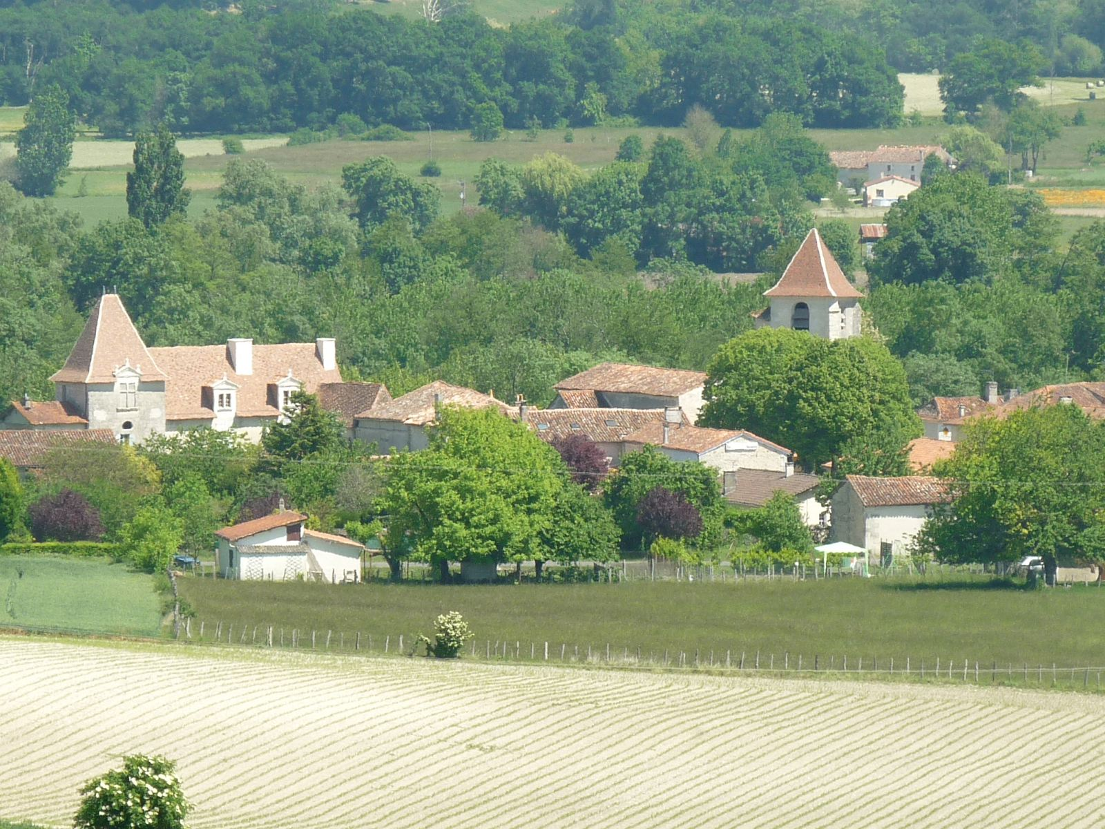 vue générale de Bonnes depuis la route des Essards (Charente, France)